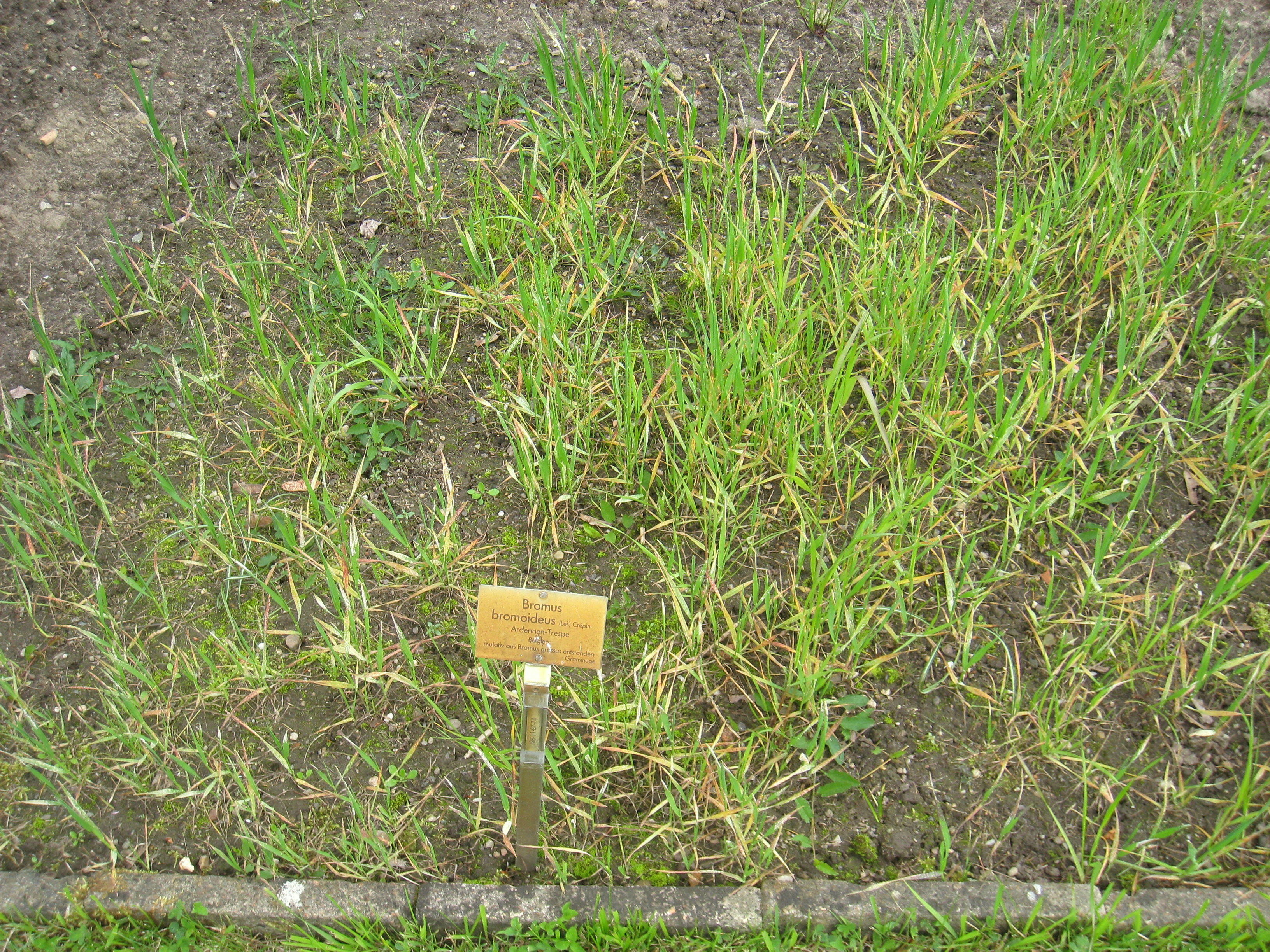 Bromus bromoideus specimen in the Botanischer Garten, Berlin-Dahlem (Berlin Botanical Garden), Berlin, Germany.